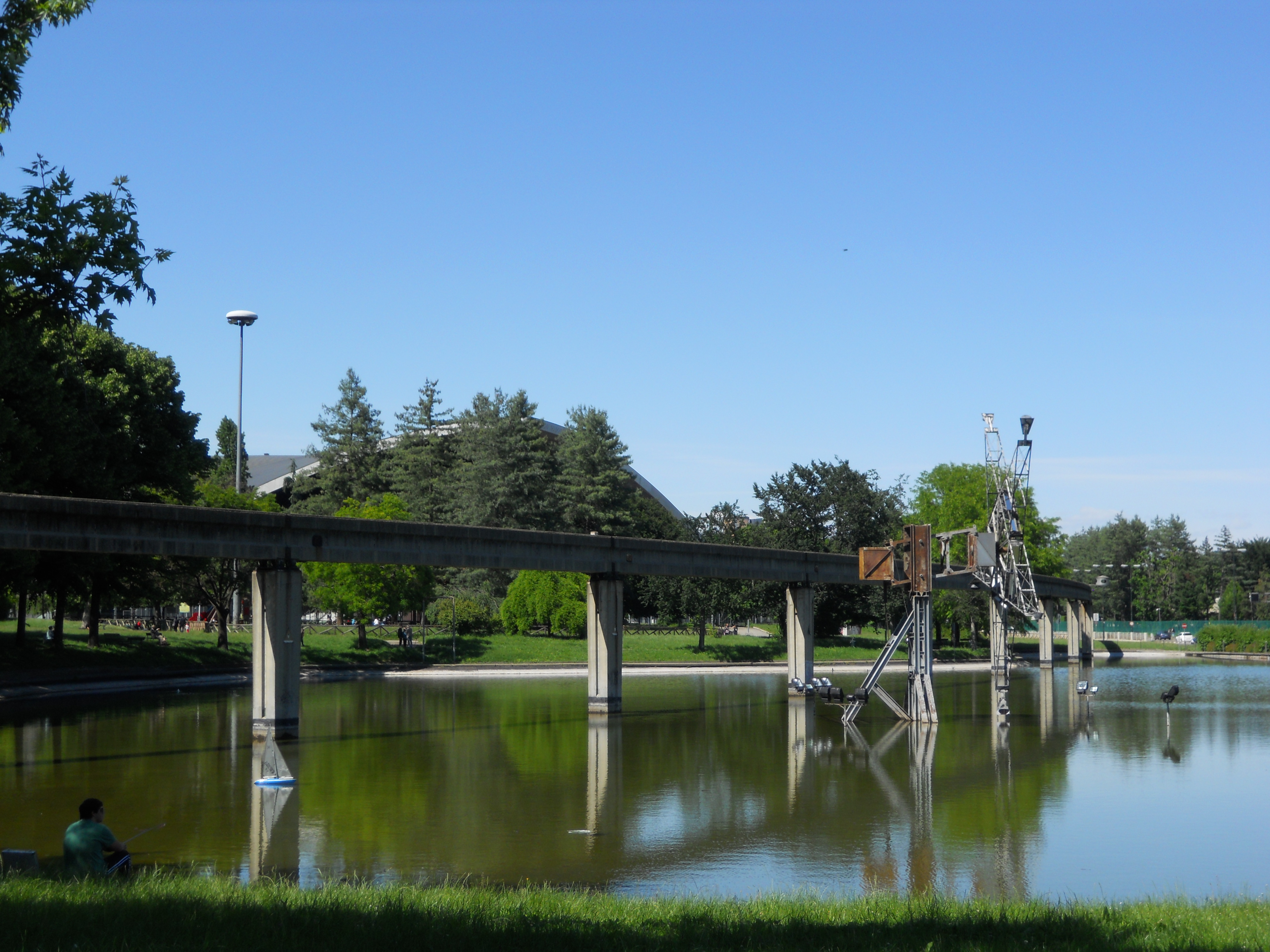 Piloni Monorotaia sul laghetto di Italia '61